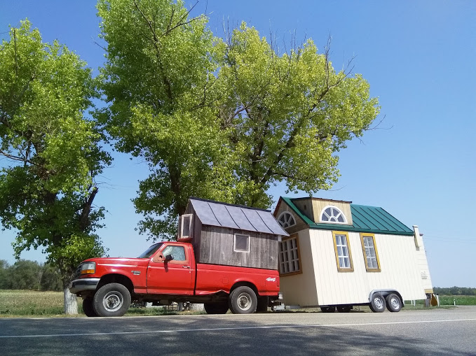 На фото момент переезда Саши Зурбаганского и СеленыРэй на крымский полуостров